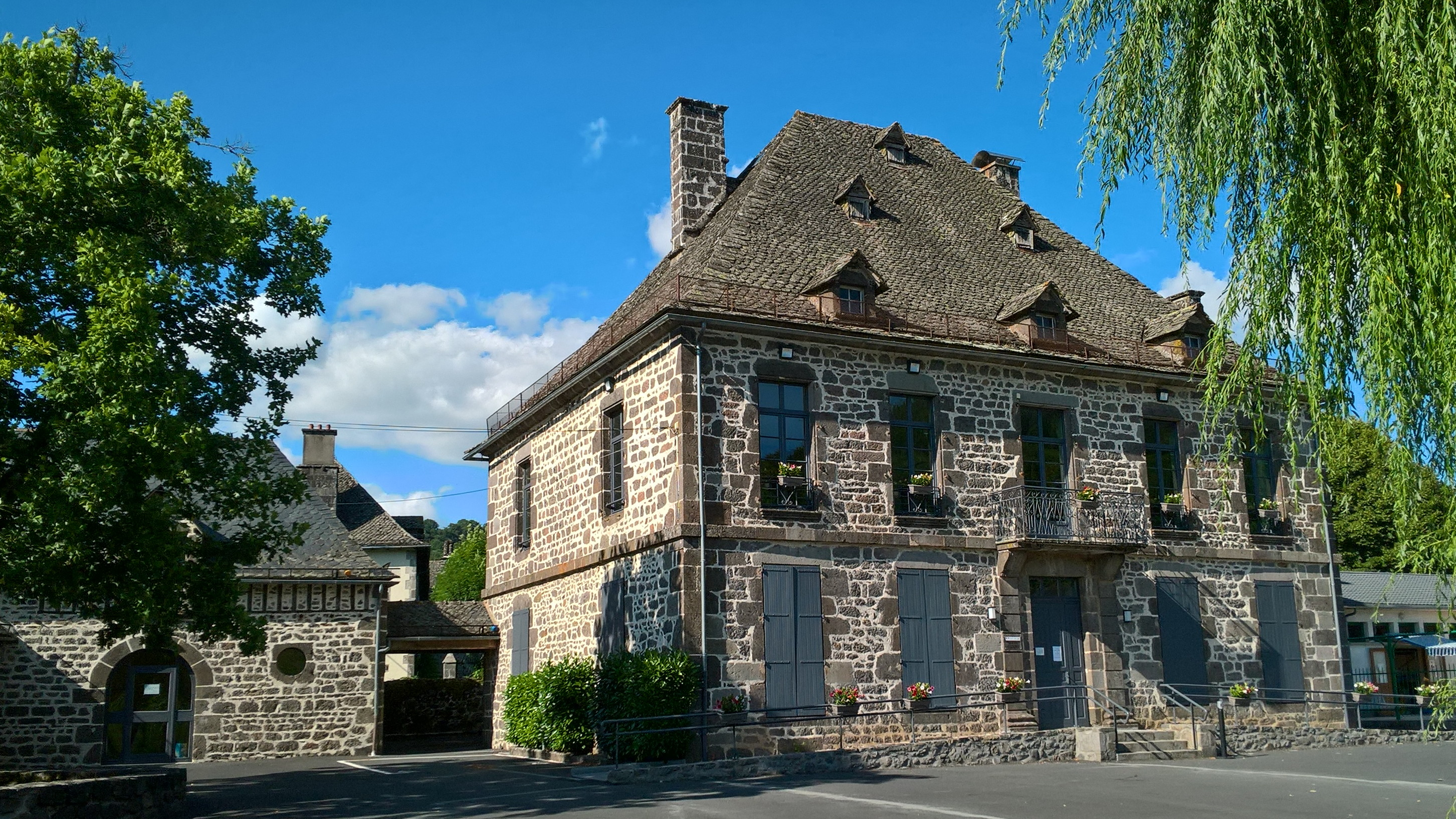 Saint-Martin-Valmeroux, mairie